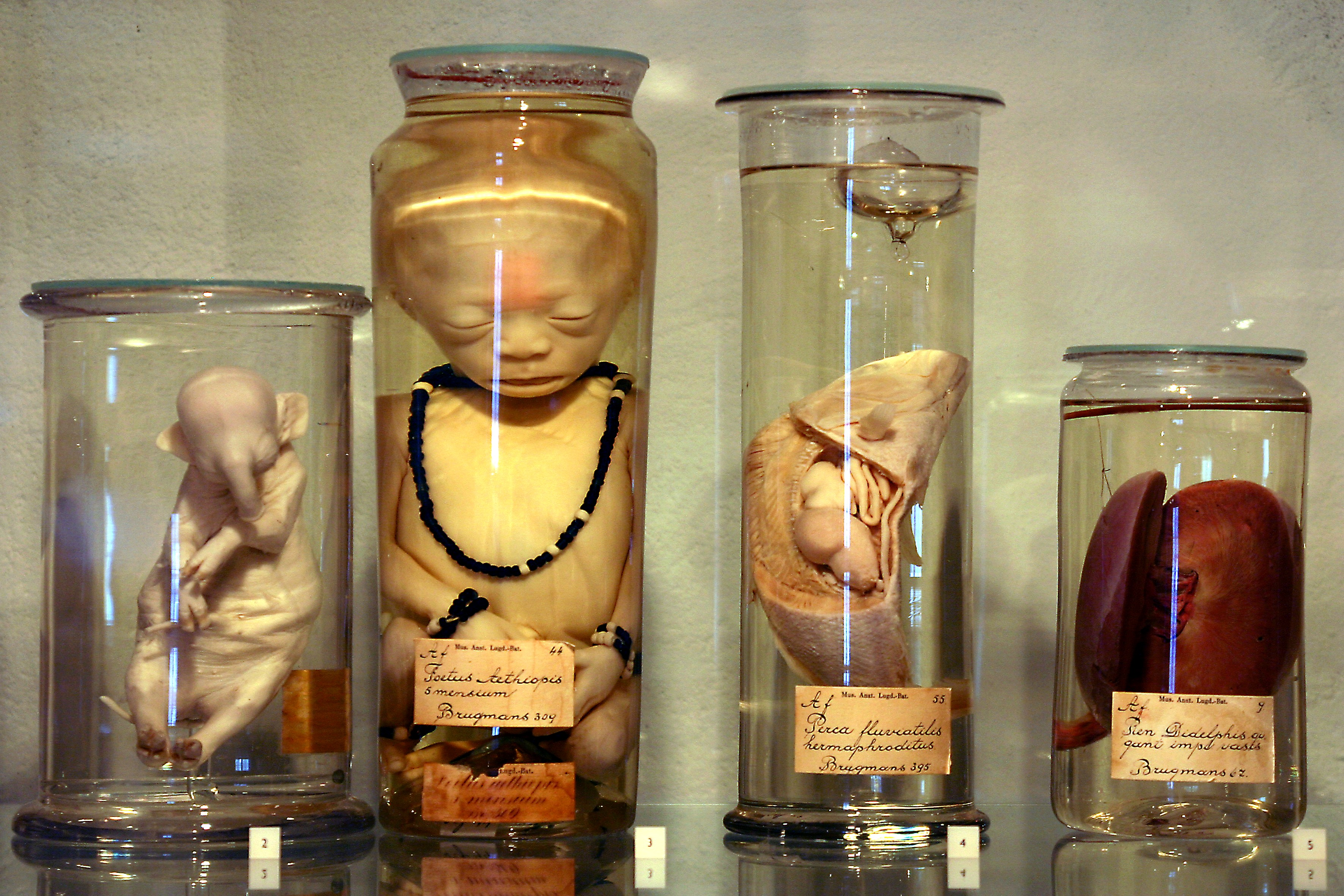 Museum Boerhaave, Leiden - Specimen by Sebaldus Justinus Brugmans.jpg Room 8